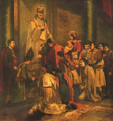 Српски (ћирилица): Свети Сава Благосиља Српчад (у црногорским народним ношњама), Ђорђе Крстић 1891.г.